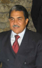 Image depicting Hernando Molina Araújo.